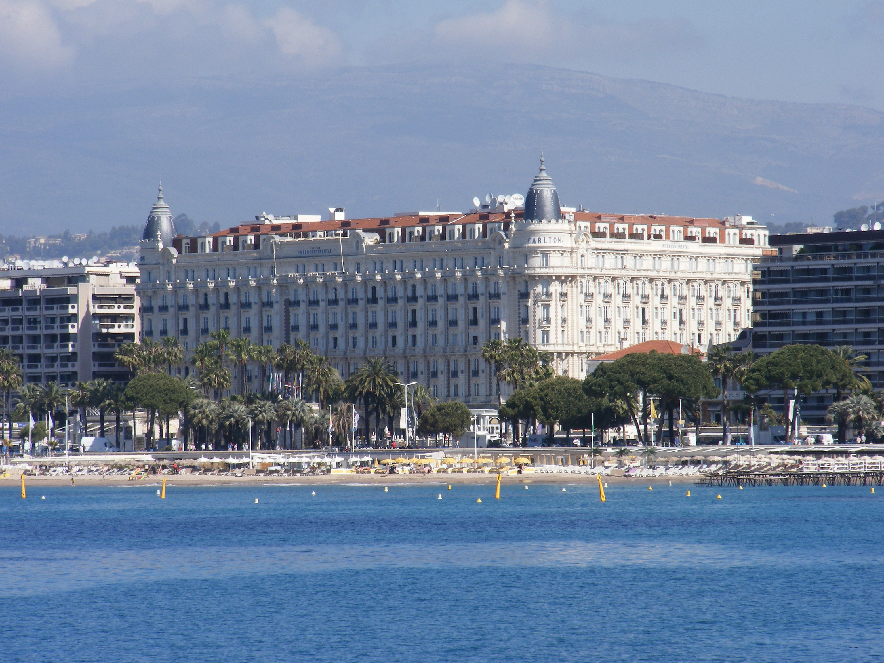 Hotel Carlton Cannes Francja - widok z nowego portu.